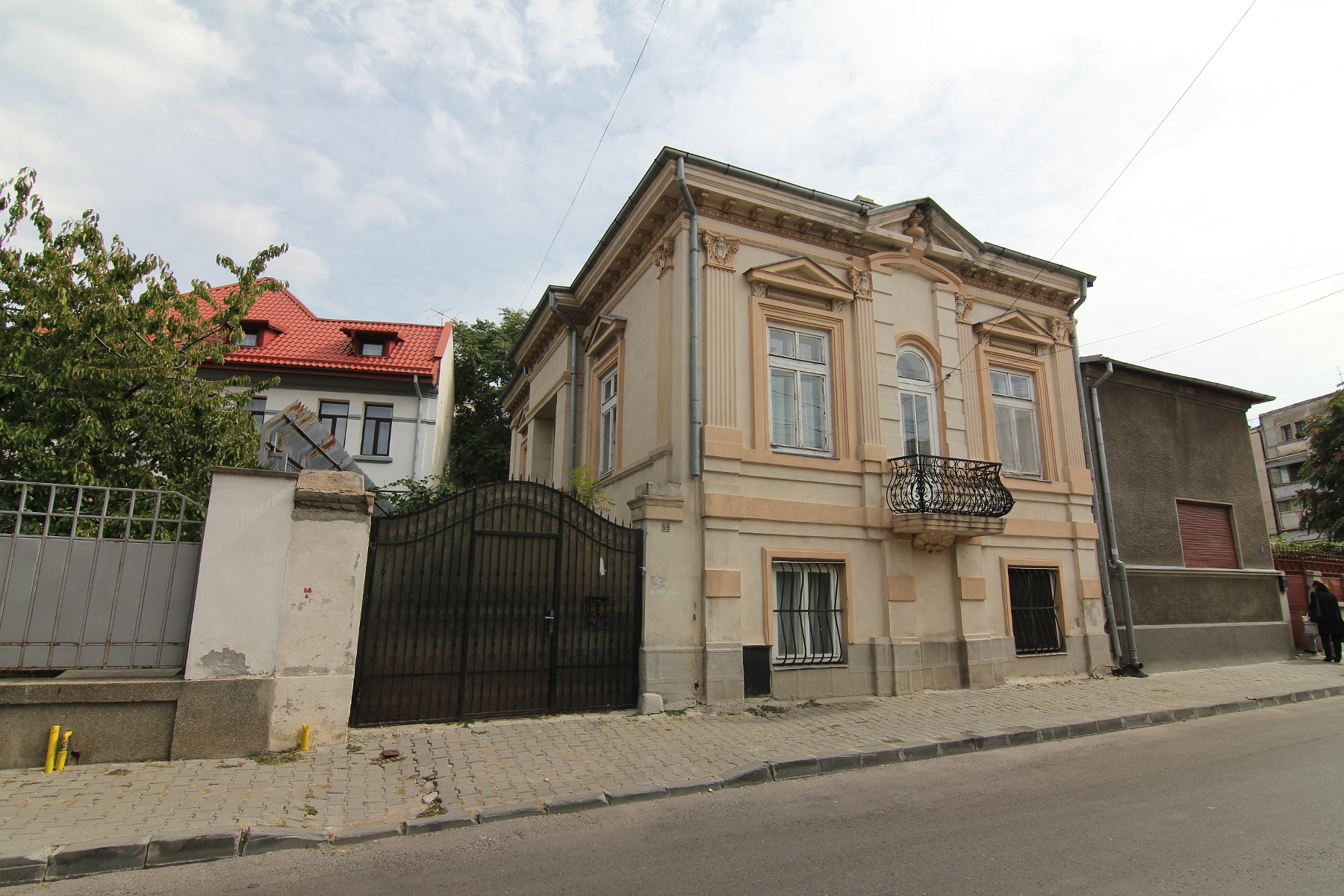 Casă pe Str Romulus